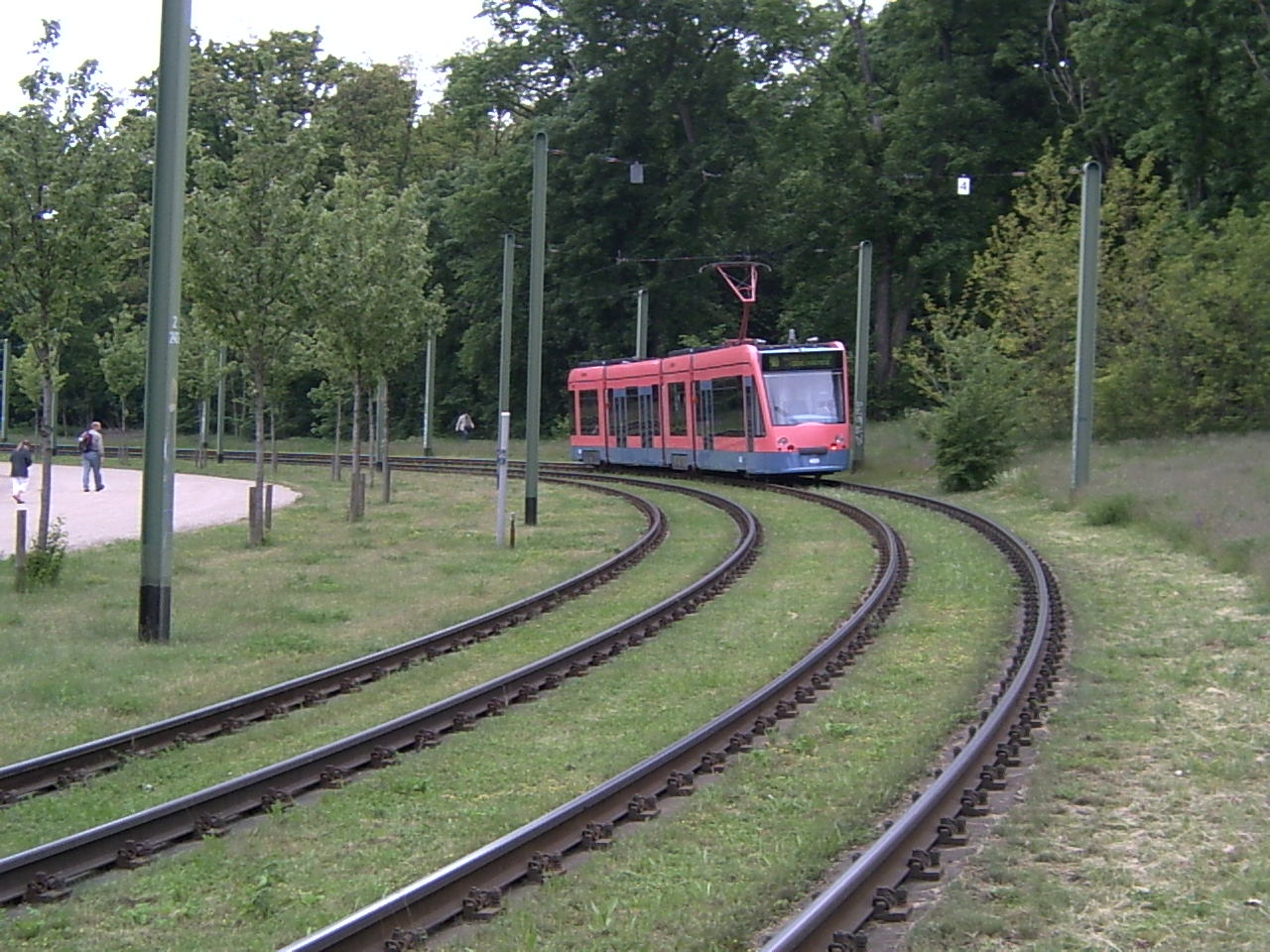 Am 22.05.2005 konnte der Combino Prototyp, der nun als Tw. 400 eingereiht wurde, im Netz der Potsdamer Straßenbahn gesichtet werden. Bereits 1997 war das Fahrzeug in Potsdam.